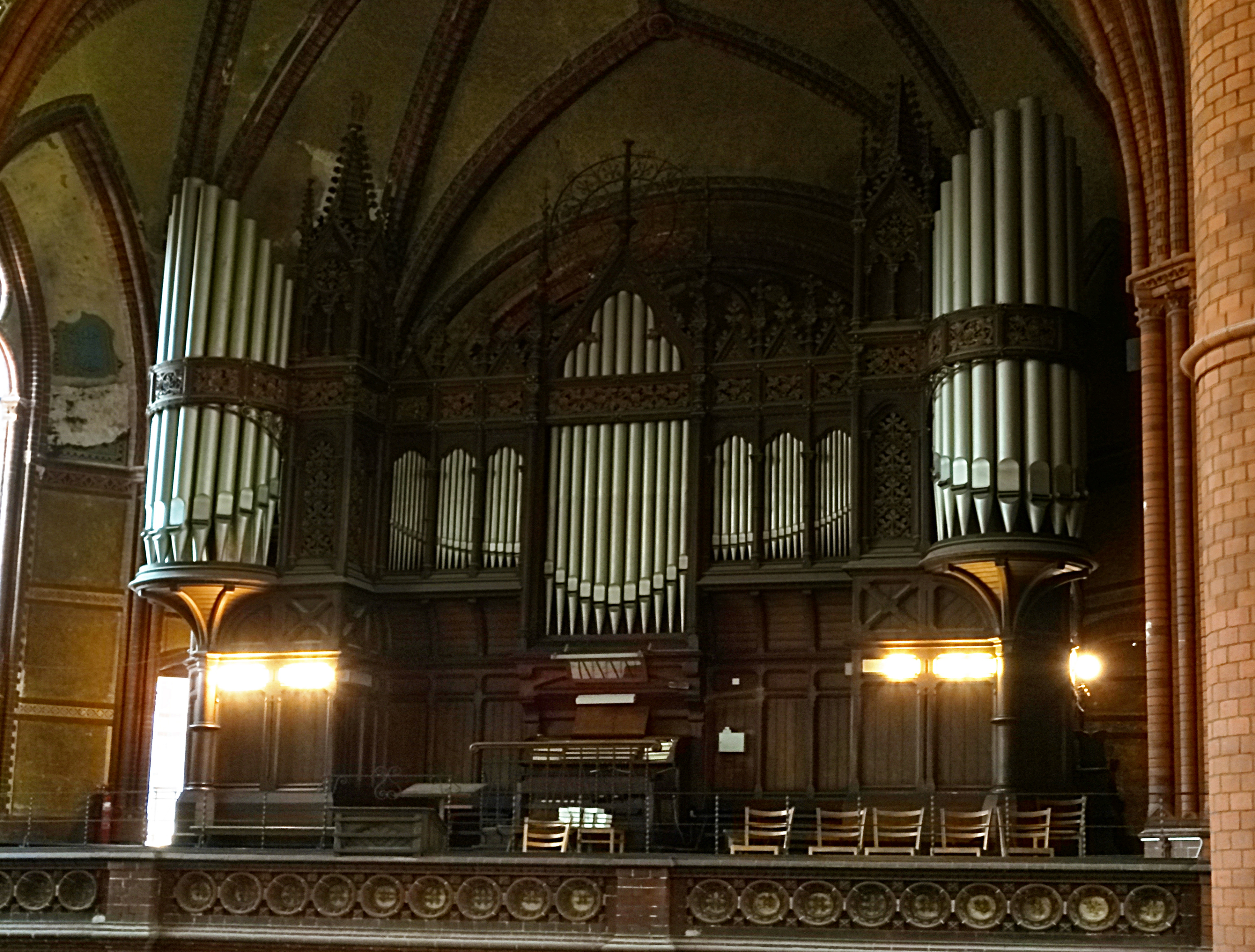 die Sauer-Orgel der Lutherkirche Apolda